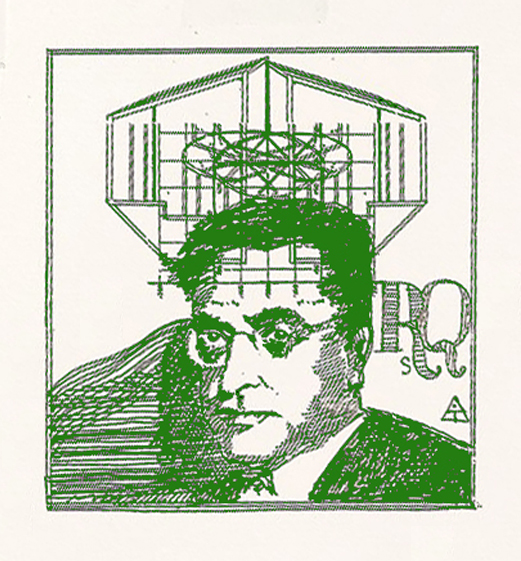 Portrait de Raymond Queneau Satrape